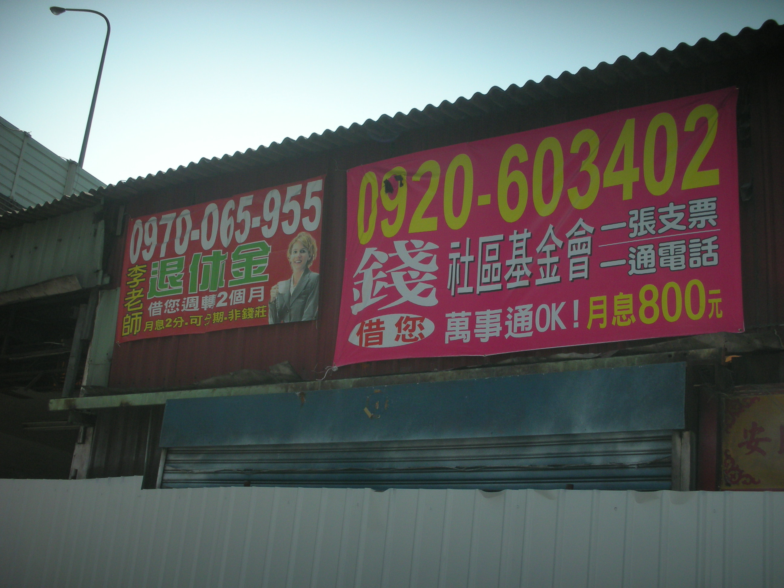 貸款廣告紅布條(很特別借錢的條件)